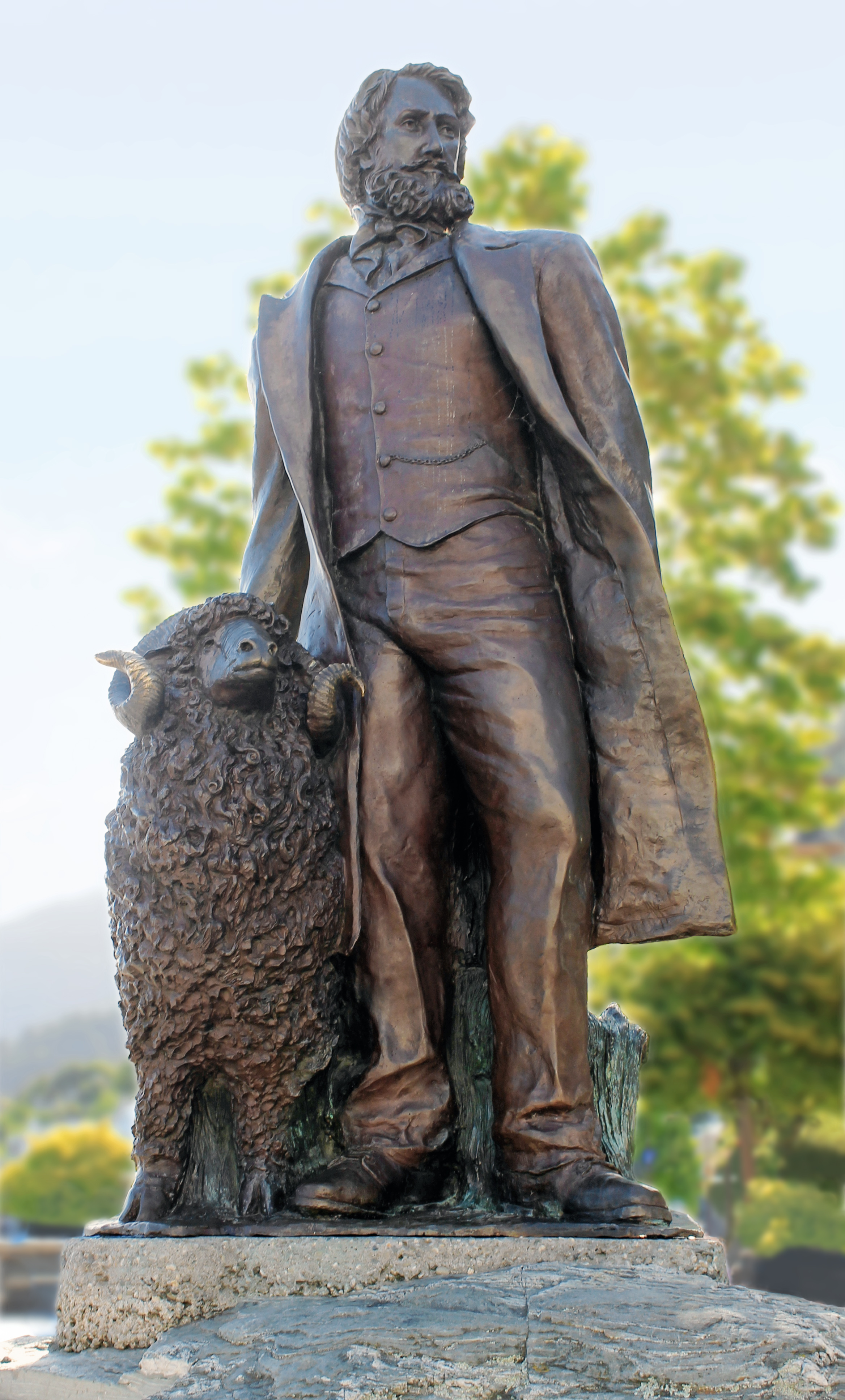 Rees, Gründer von Queenstown